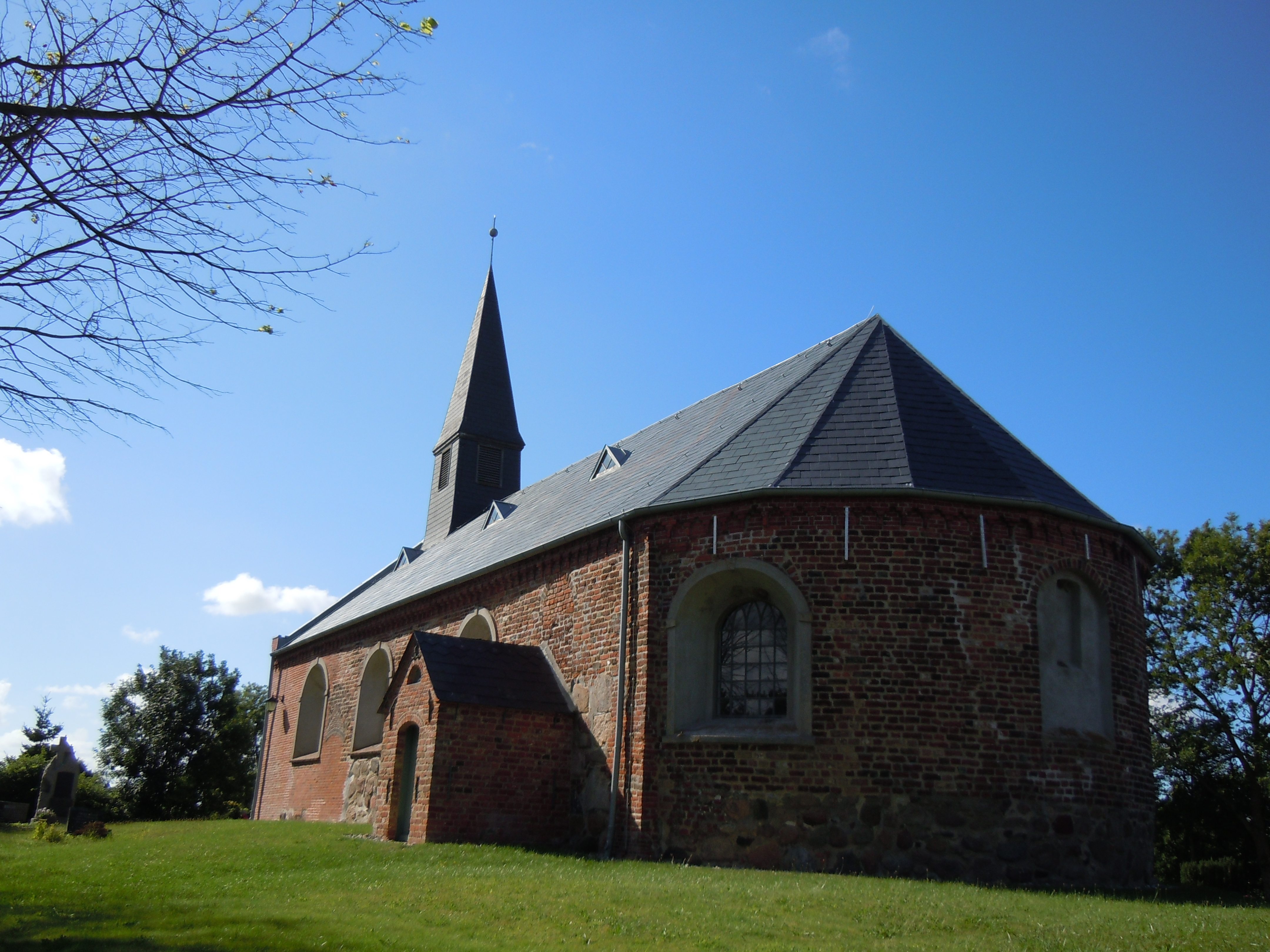 Kirche St. Martin in Vollerwiek